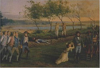 Exécutions d'émigrés à Vannes en 1795, des suites de l'expédition de Quiberon.